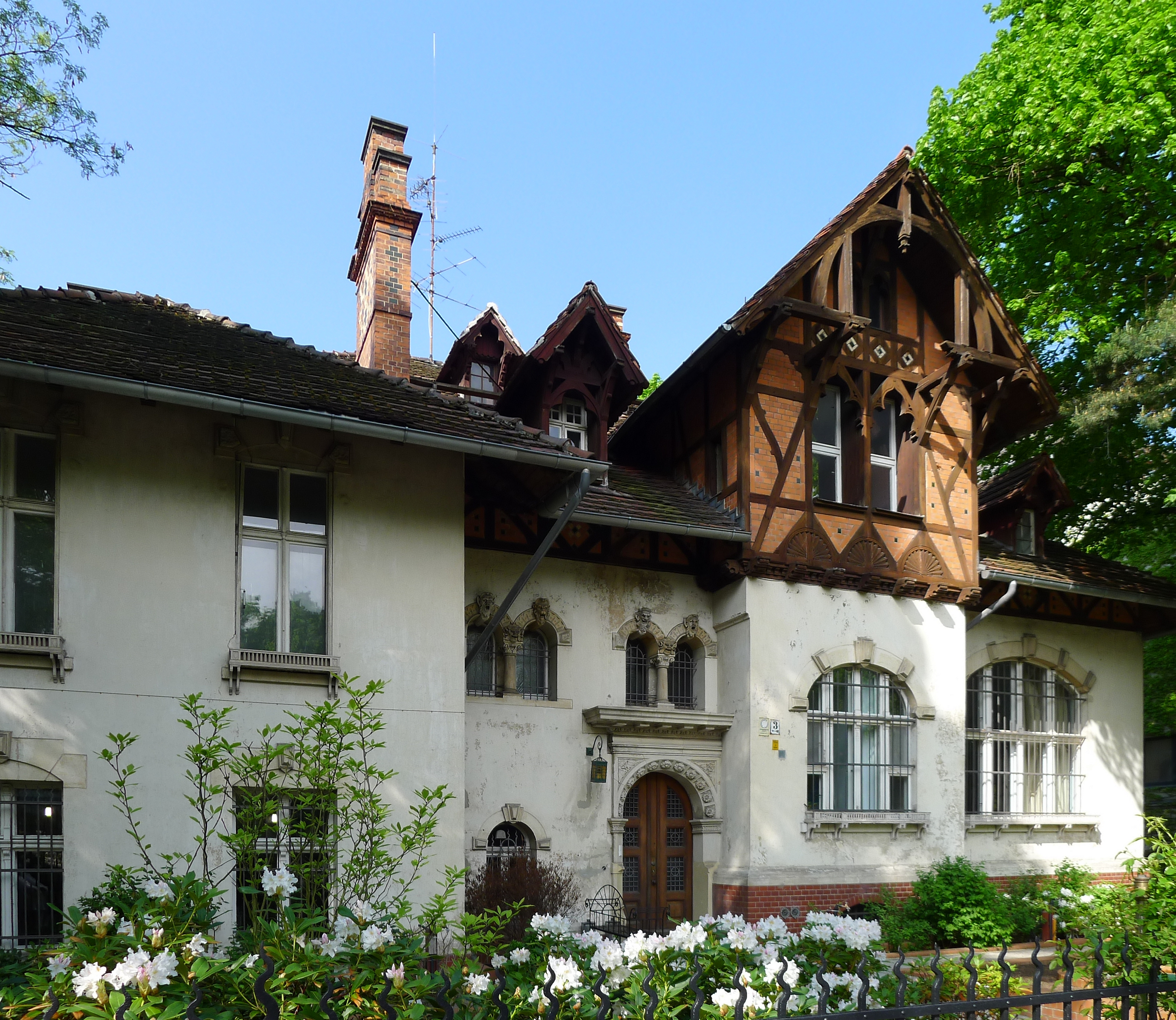 Wohnhaus